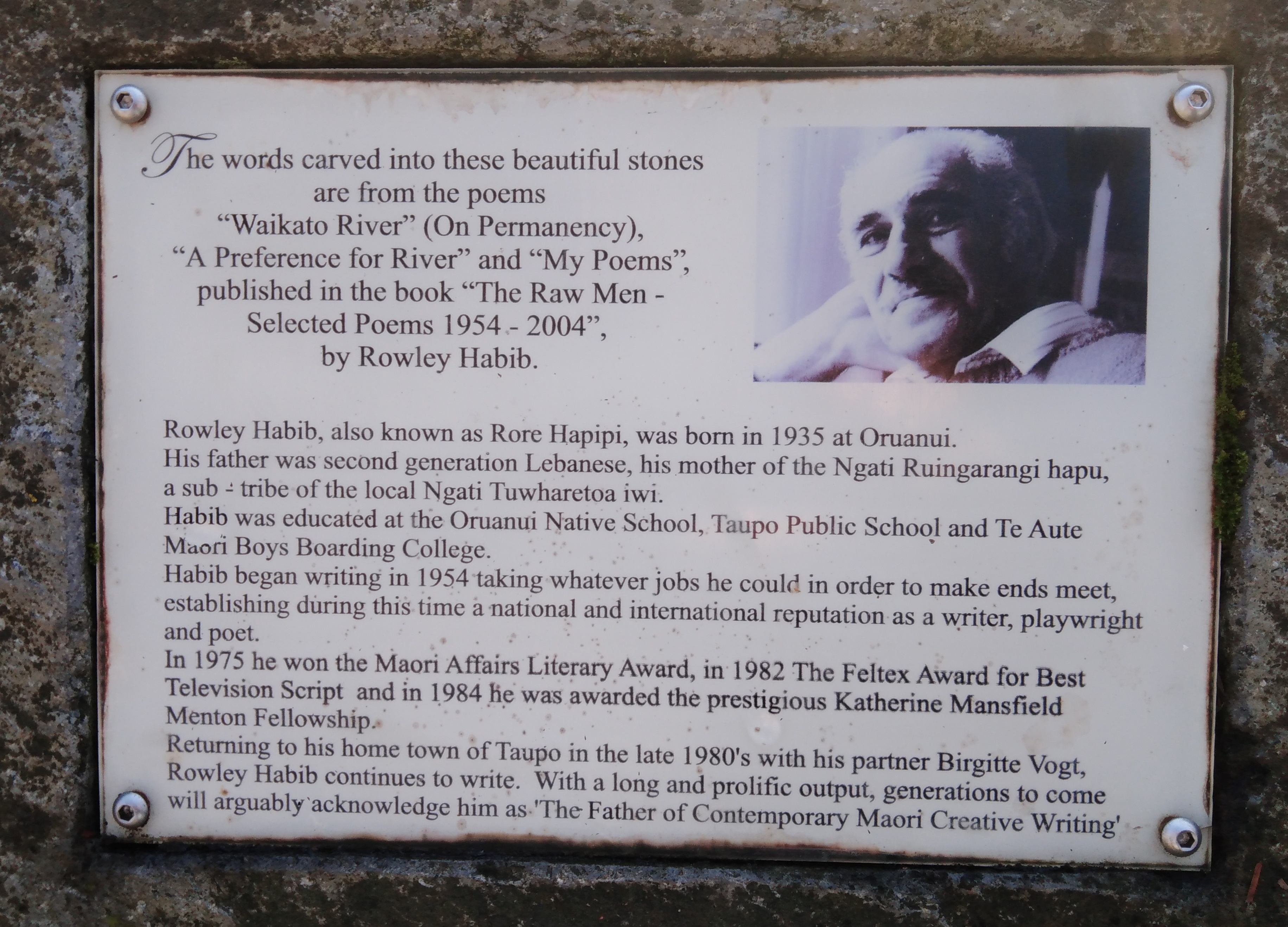 Placa en homenaxe a Rowley Habib en Taupo